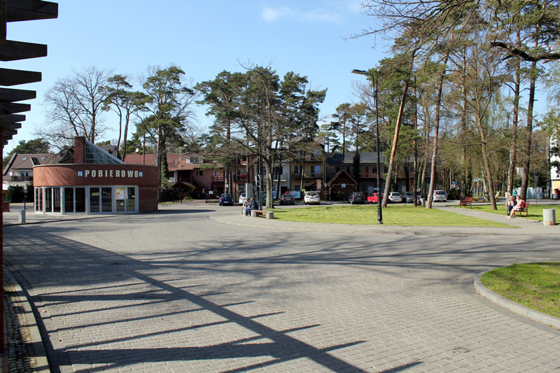 Der Busbahnhof des Ferienortes Pobierow.